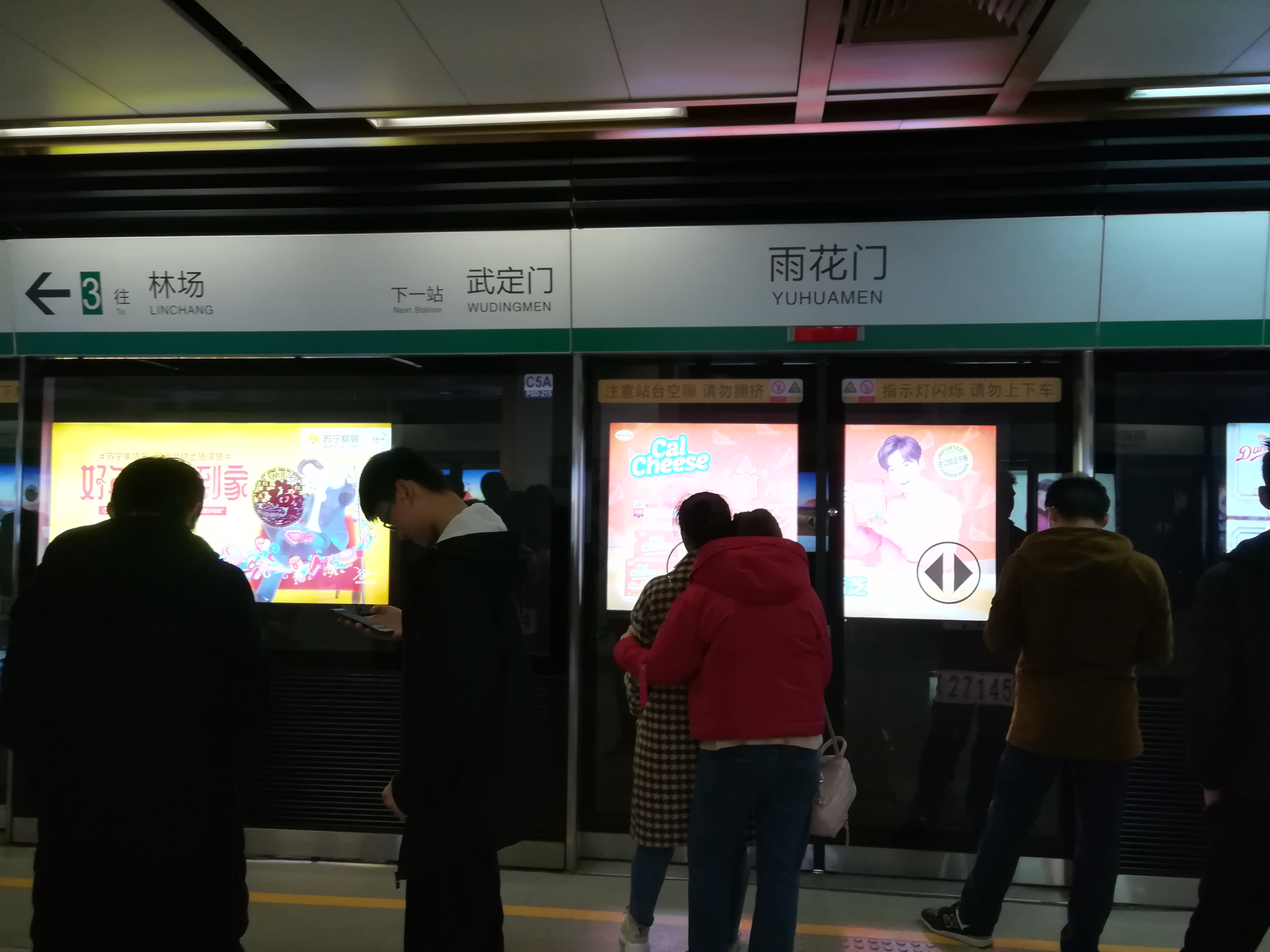 中文（中国大陆）: 雨花门站，南京地铁